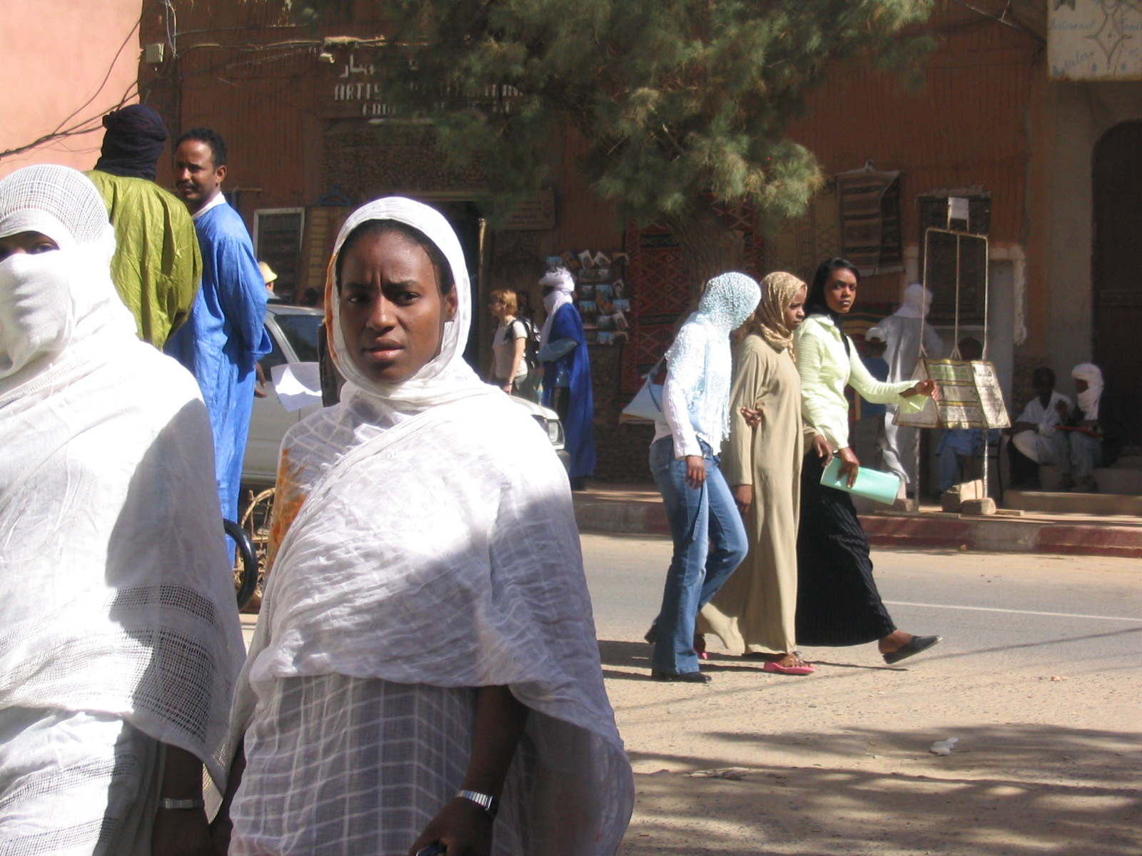 Scène de rue de Tamanrasset